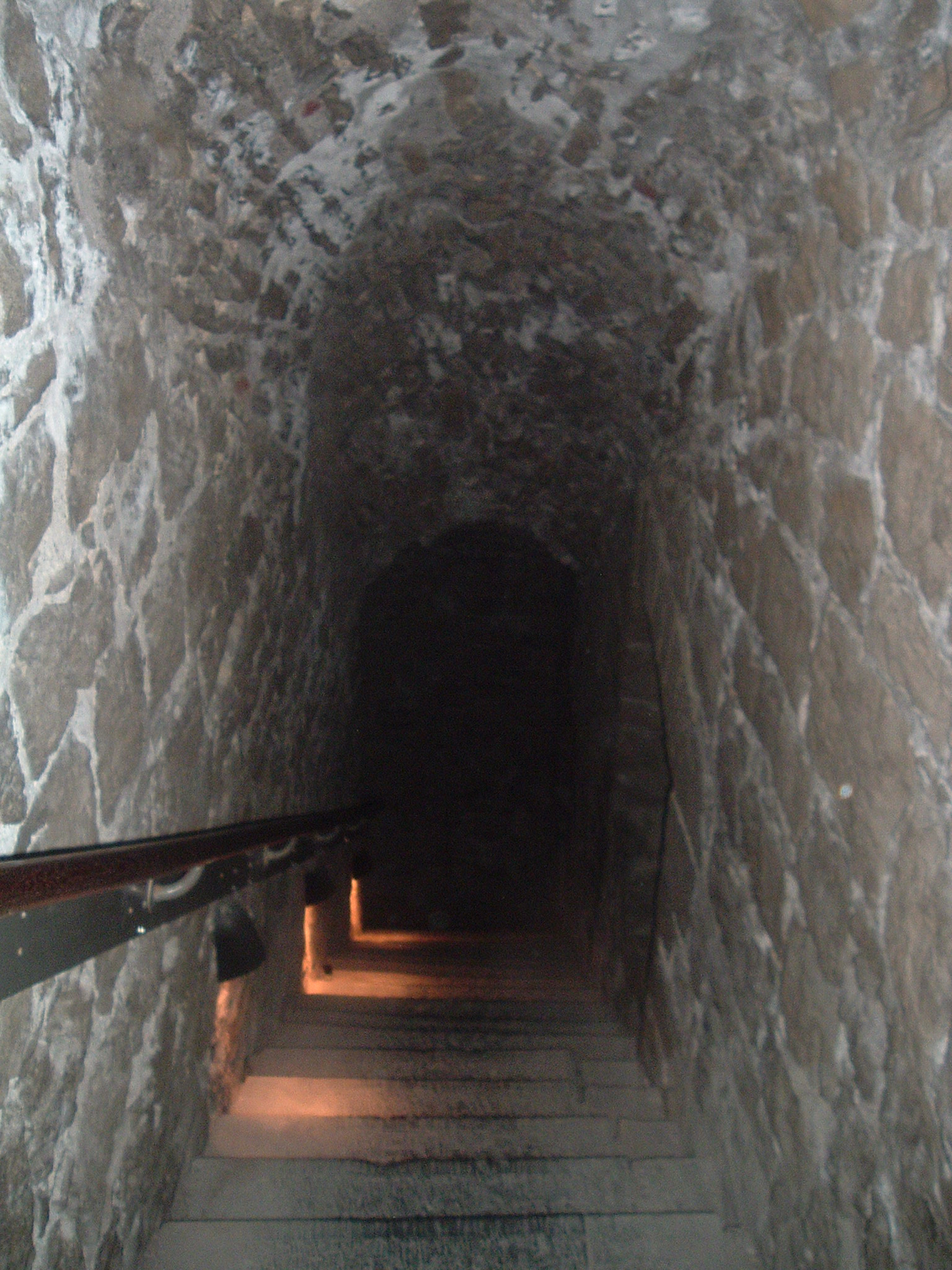 Escalier de la Tour Burbant Ath Belgique